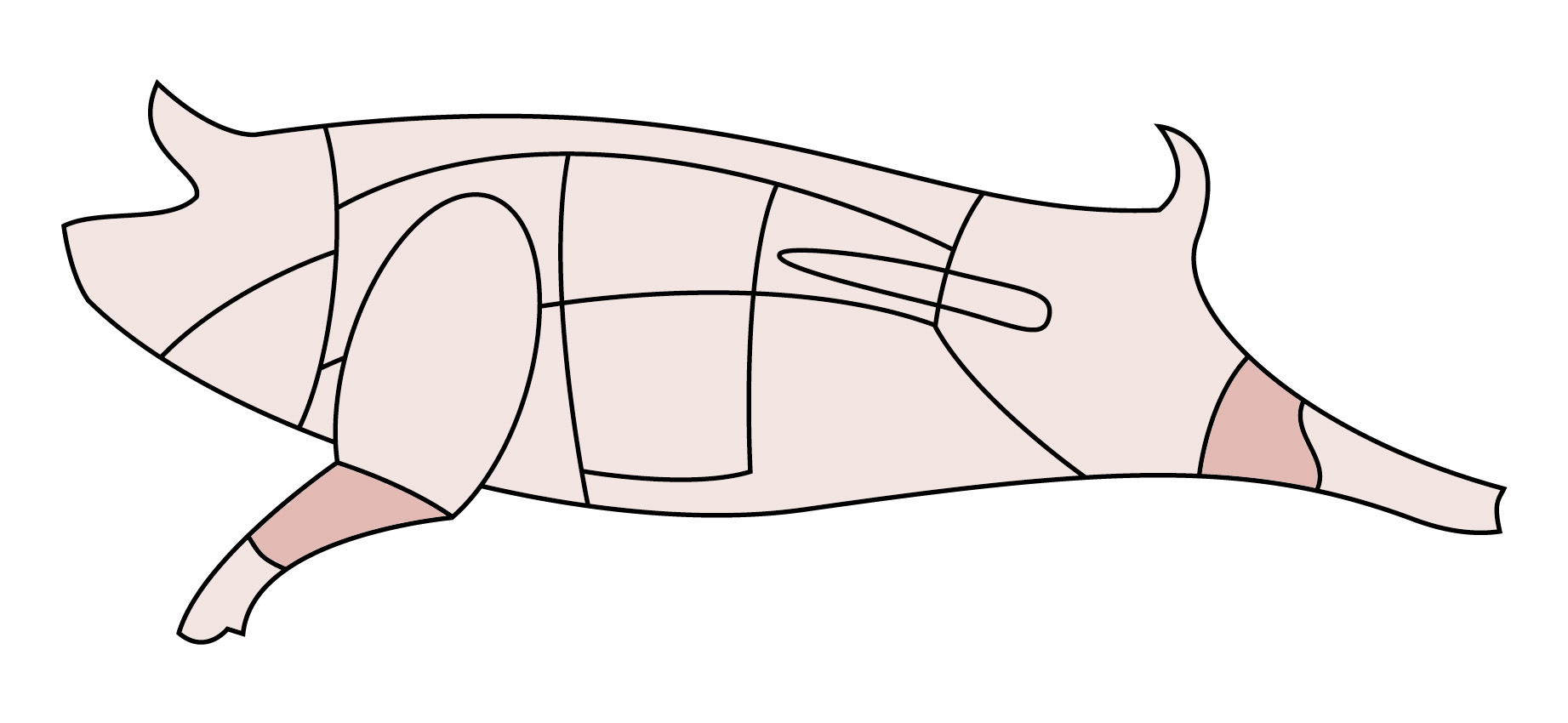 Schematische Darstellung eines Schweins, Eisbein. Eigene Zeichnung. GNU-FDL